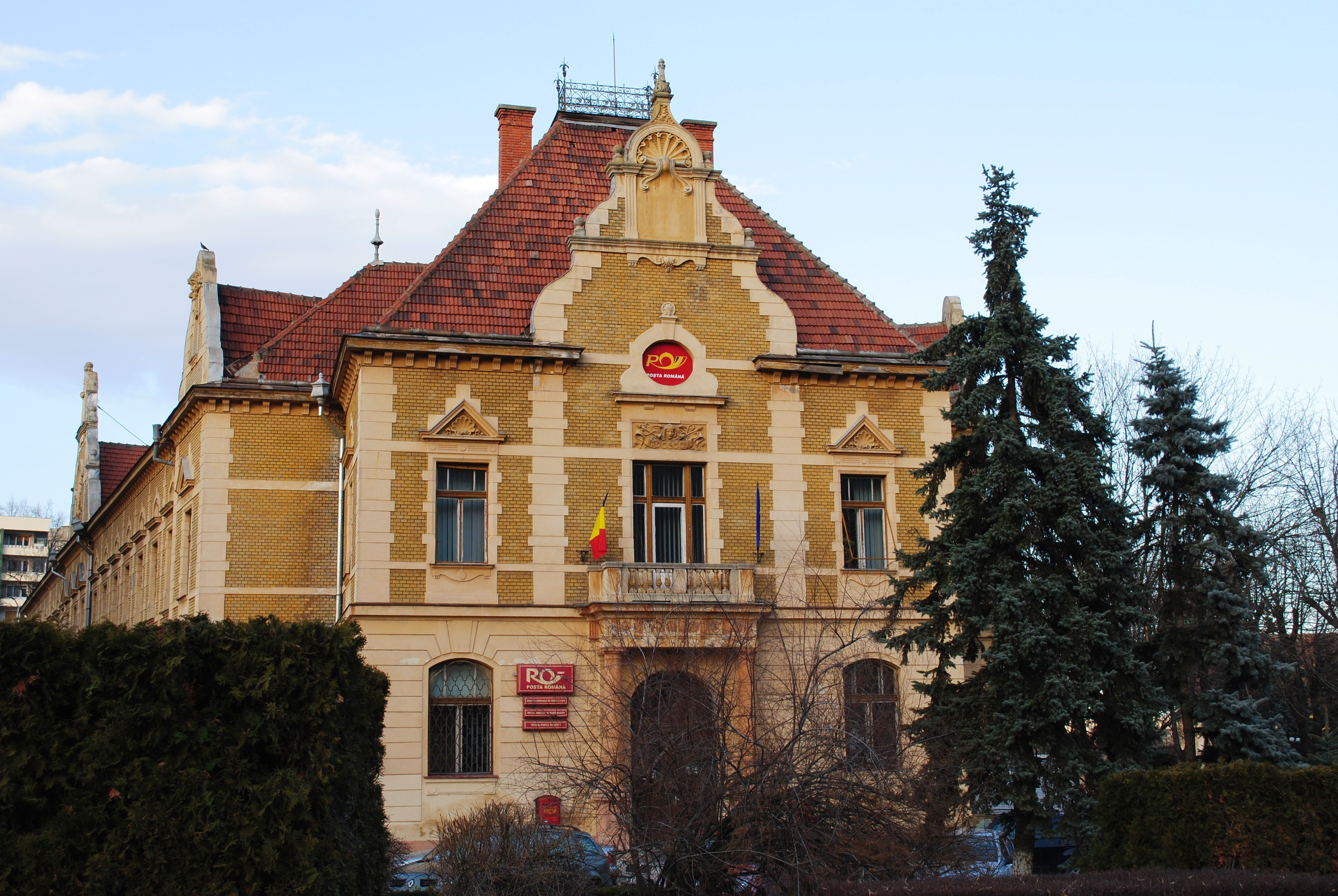 Palatul Poștelor, 1907